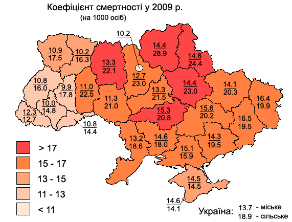 Death rate in Ukraine, 2009. Urban/rural: Смертність серед міського і сільського населення у 2009 році